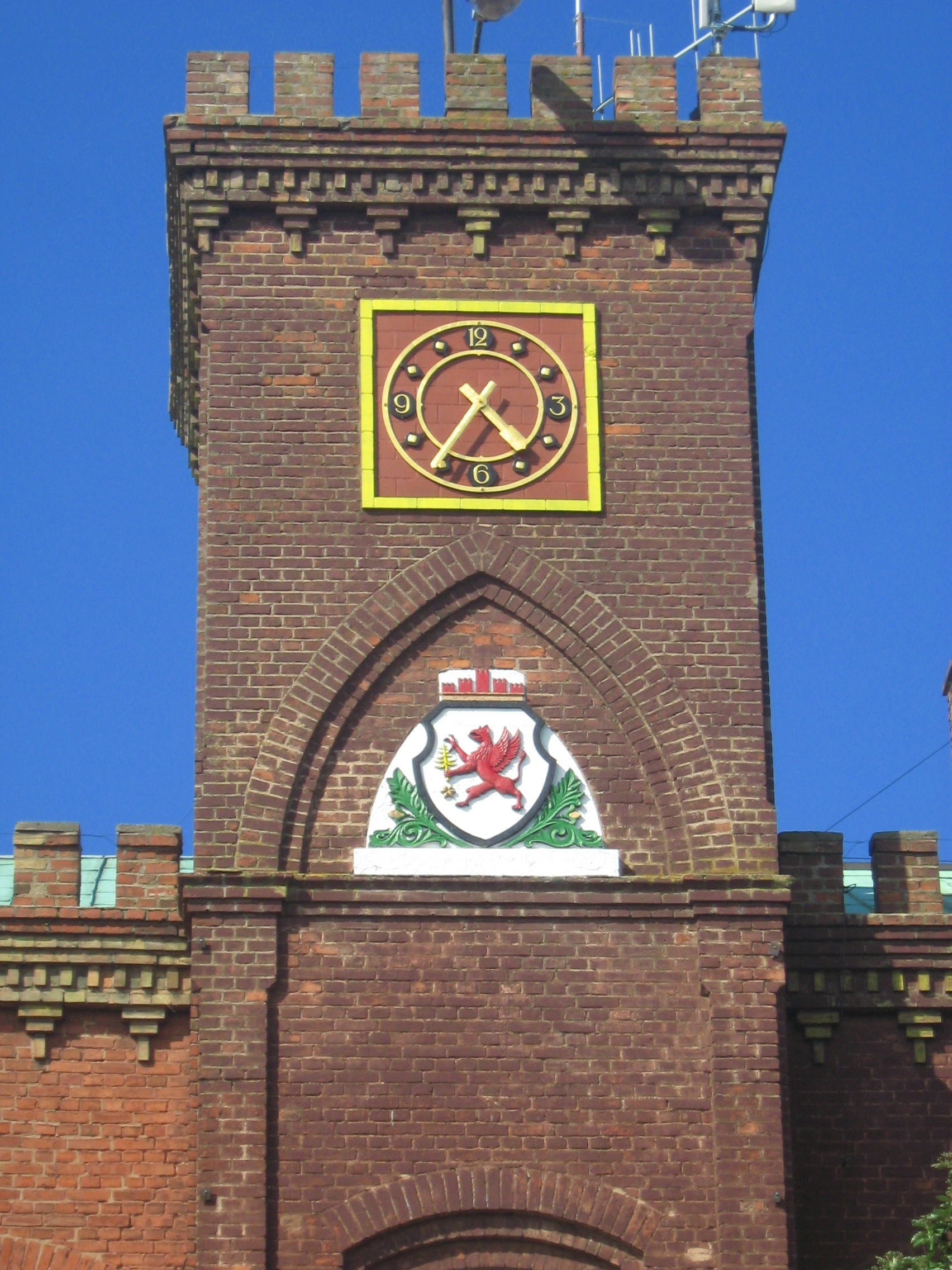 Herb Wolina (przedwojenny) na budynku Ratusza w Wolinie.